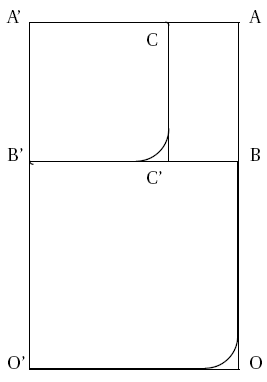 fractal squares on A4 paper